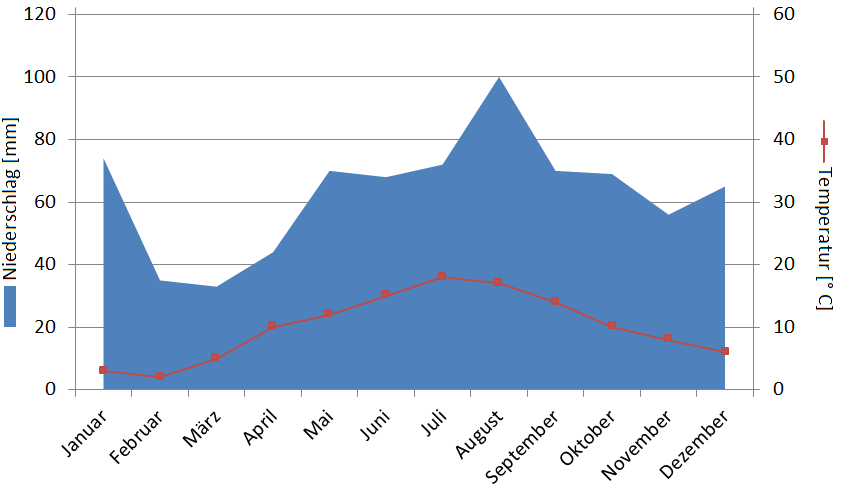 Klimadiagramm der letzten Jahre aus eigener Wetterstation